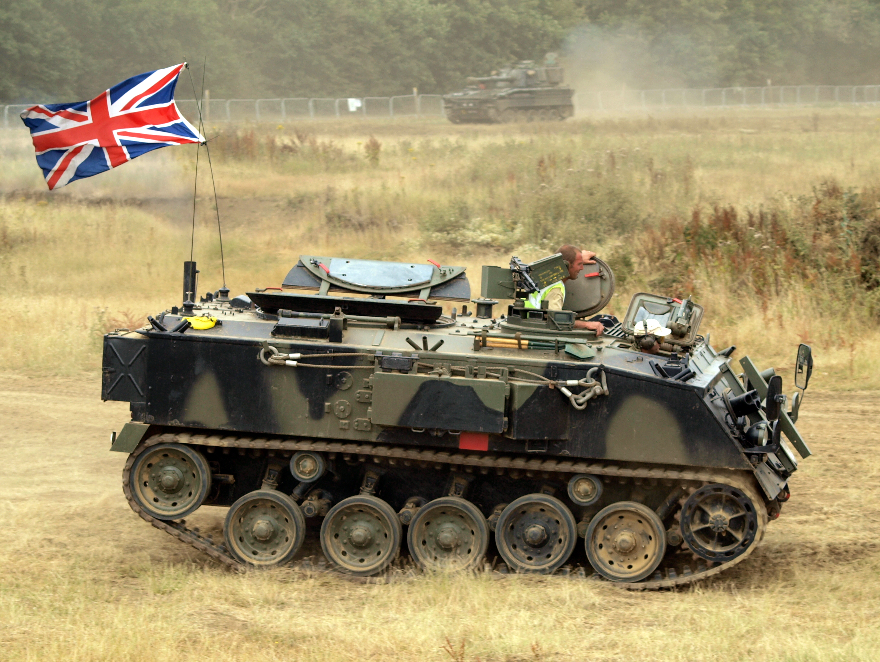 GKN-Sankey FV432 APC